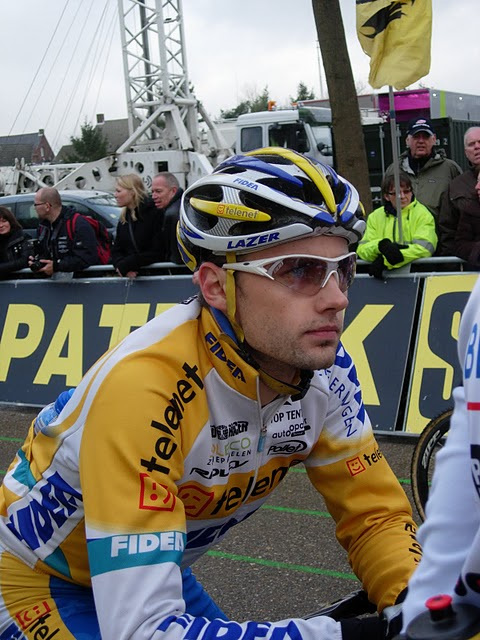 Rob Peeters (Geel, 2 juli 1985) is een beloftevolle Belgische veldrijder uit Mol-Sluis.